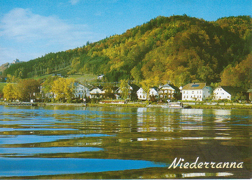 Niederranna an der Donau